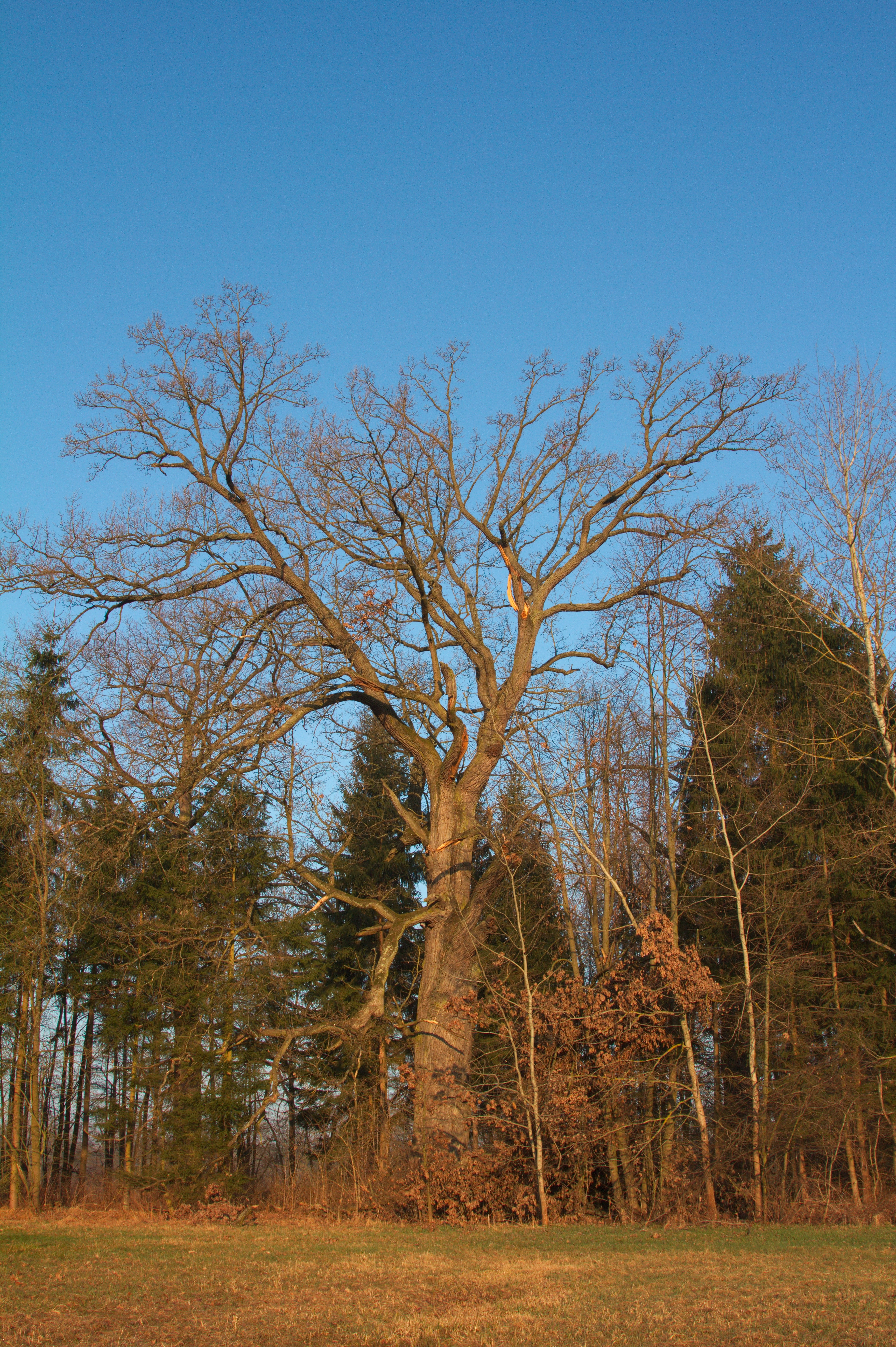 PP Branské doubí